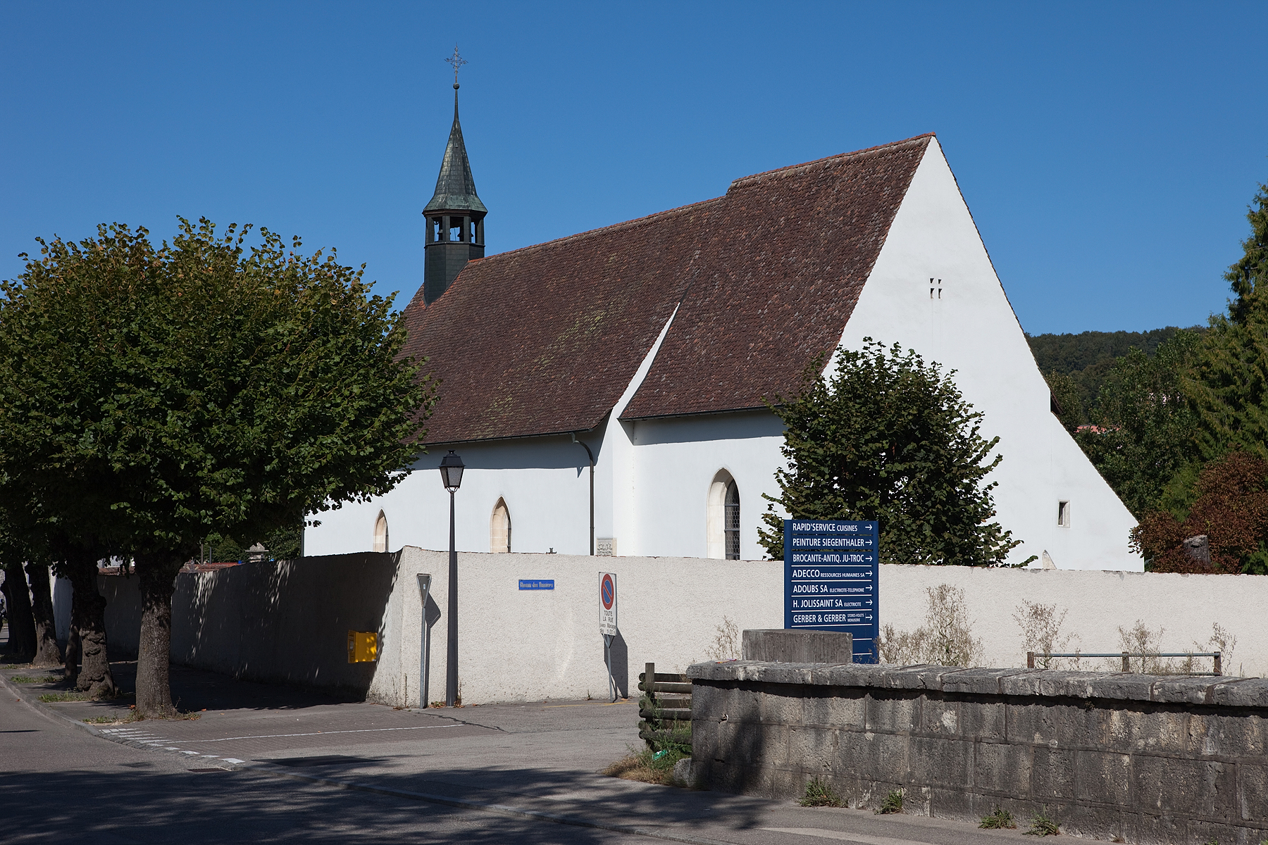 Eglise St-Germain (13e-17e s.) à Porrentruy (JU)